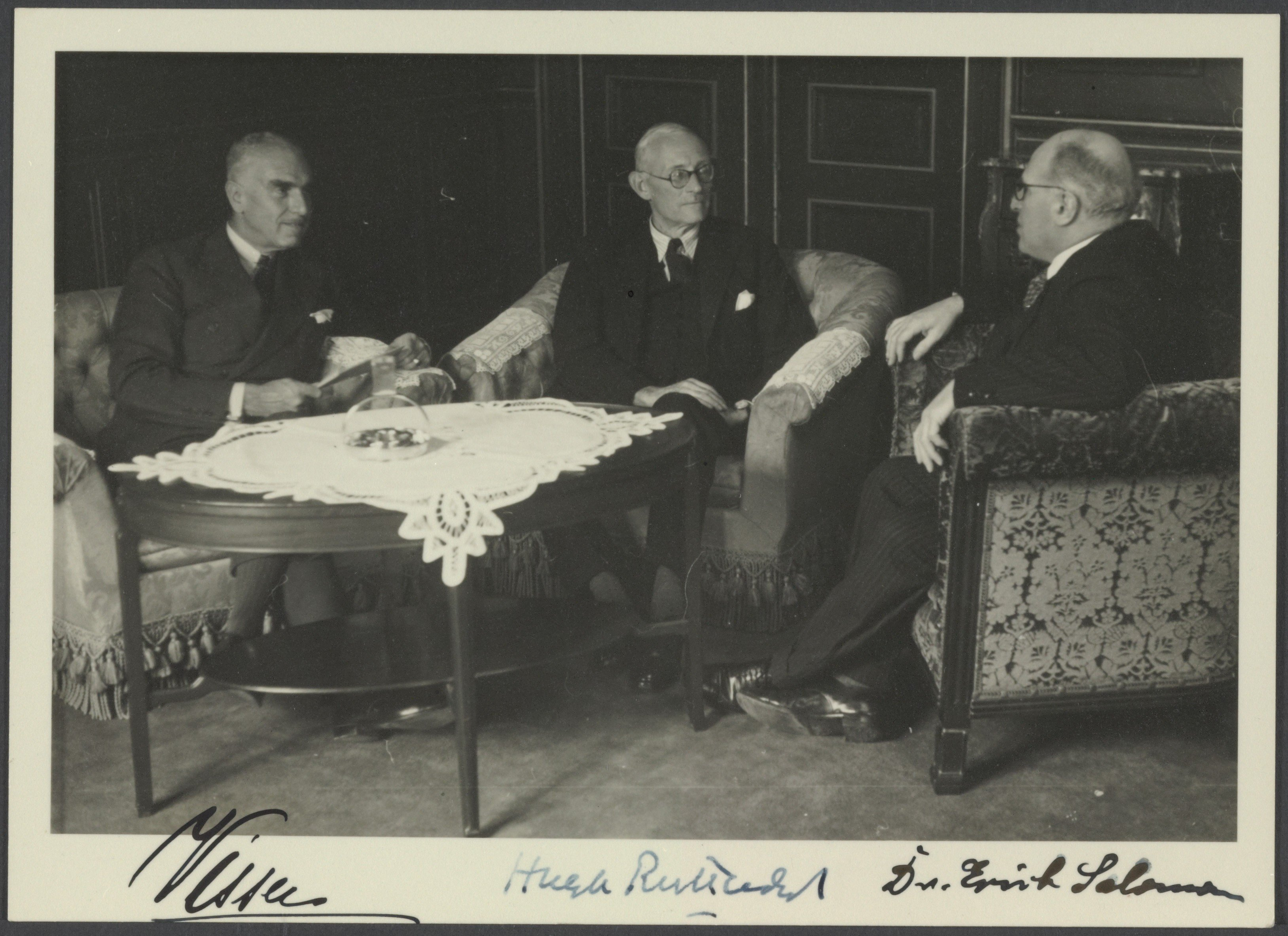 Collectie / Archief : Collectie 558 Ph. C. Visser Reportage / Serie : [ onbekend ] Beschrijving : Gezelschap van drie heren. V.l.n.r. Ph.C. Visser, Hugh Ruttledge en Erich Salomon Datum : 1930 Persoonsnaam : Ruttledge, H., Salomon, E., Visser, Ph.C. Fotograaf : [onbekend] Auteursrechthebbende : Nationaal Archief Materiaalsoort : Foto (zwart/wit) Nummer archiefinventaris : bekijk toegang 2.21.284 Inventarisnummer : 17 Bestanddeelnummer : 17_039